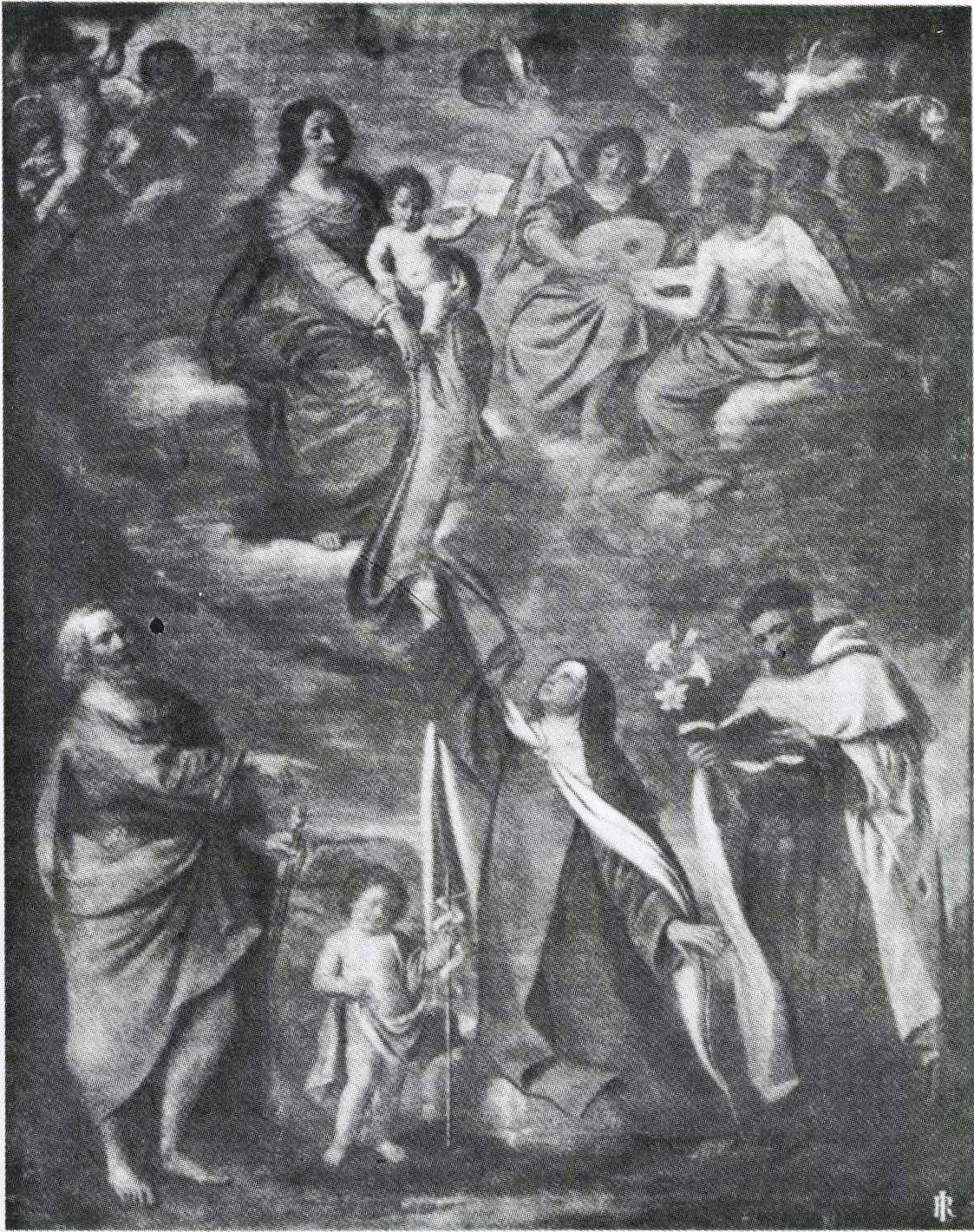 La Madonna del Carmine con San Giuseppe e Santa Teresa e Gloria d' Angeli, dalla Chiesa di San Gregorio a Messina.